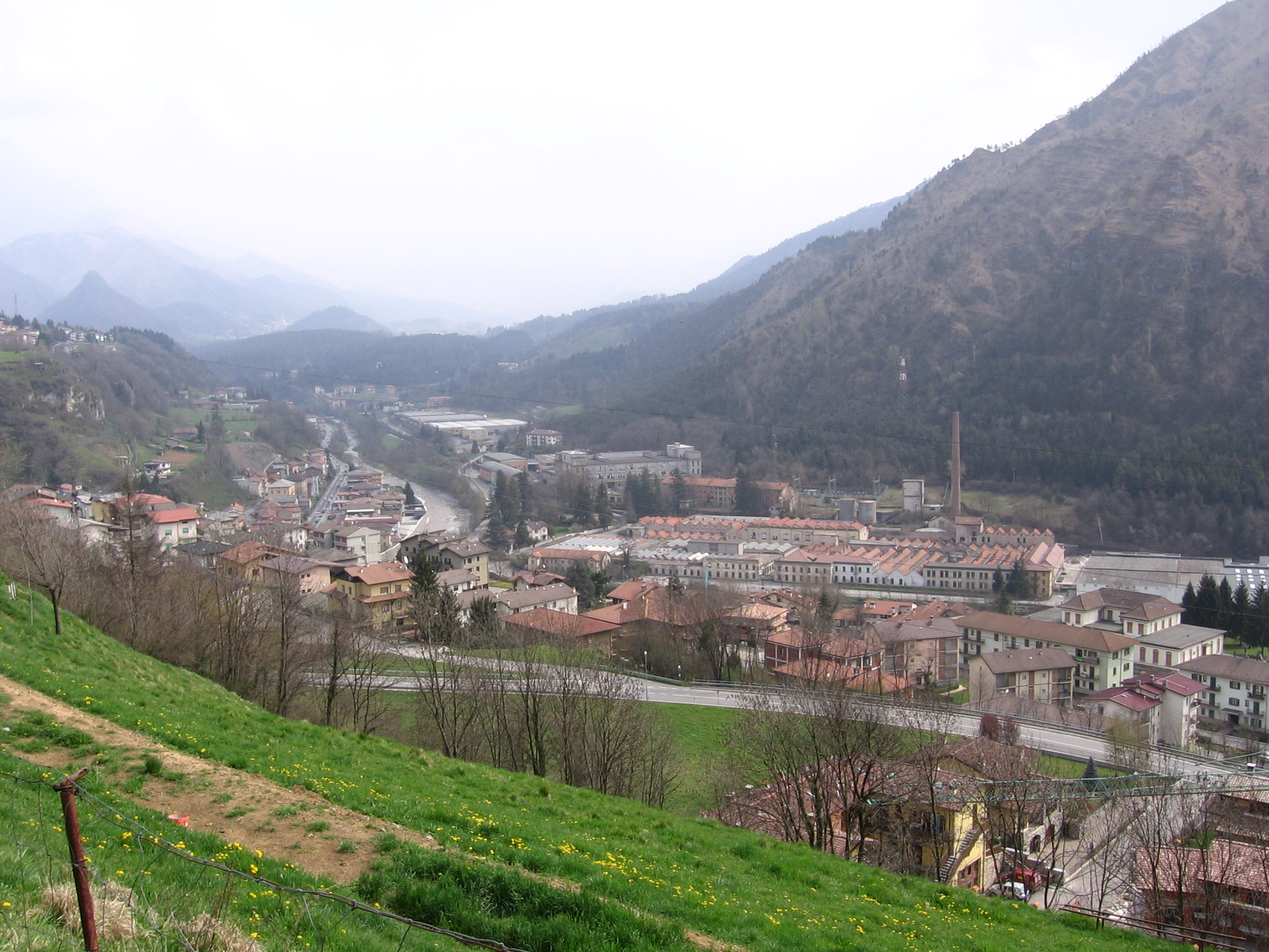 Ponte Nossa, Bergamo, Italia